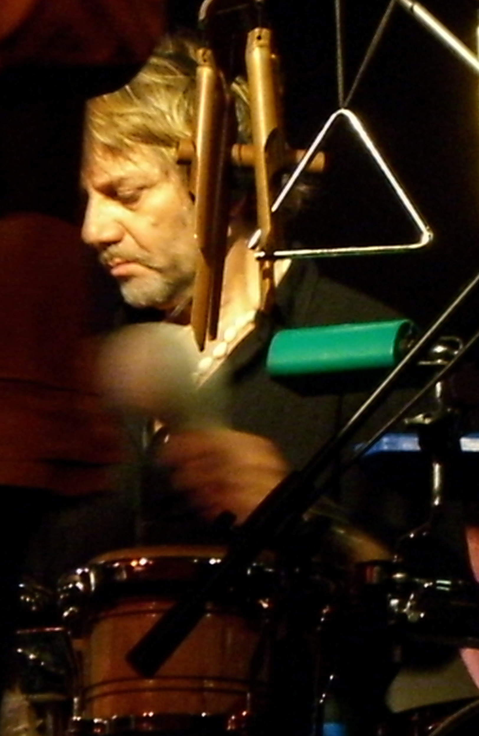 Torre Pali - Marina di Salve (Lecce) - Salento